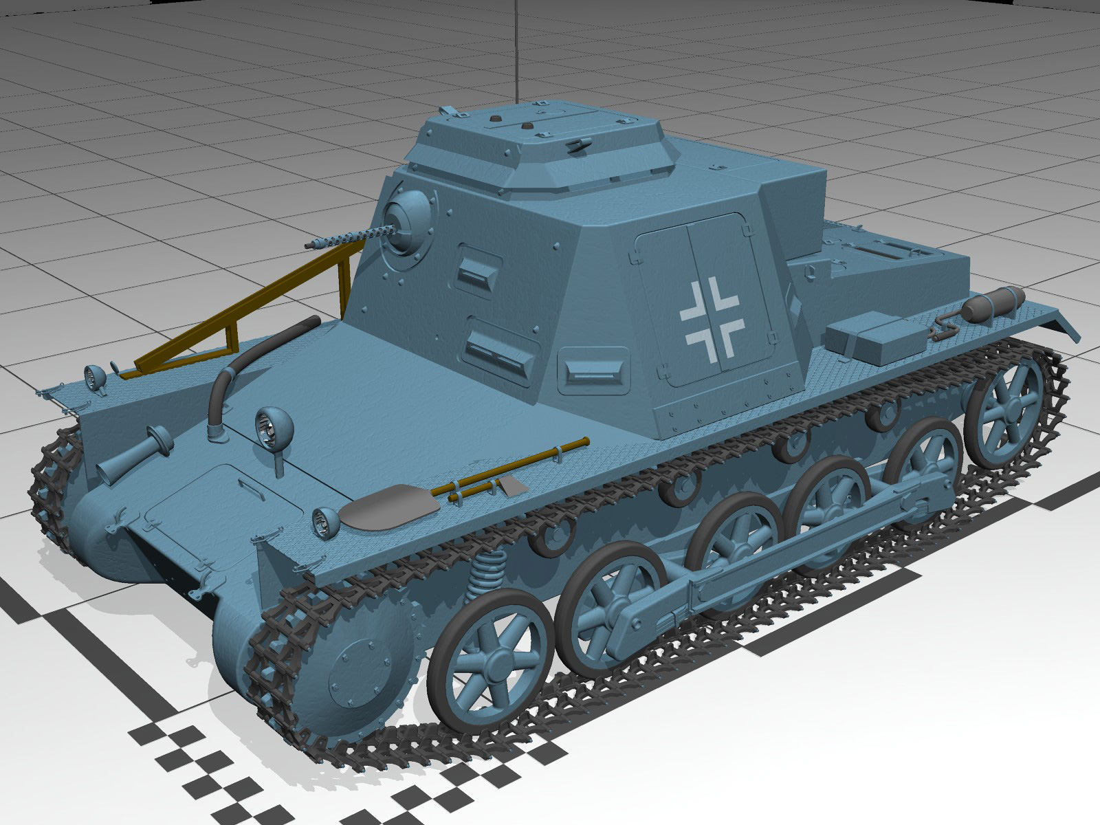 PanzerBefehlsWagen I B (3D model, isometric view)